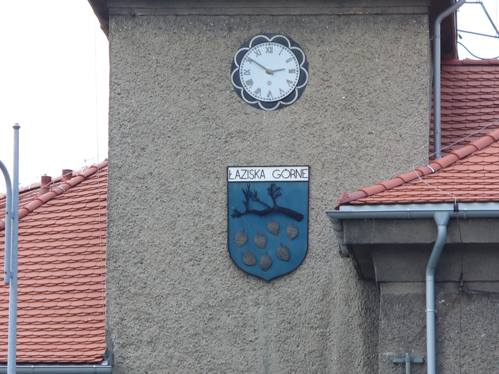 Ober Lazisk